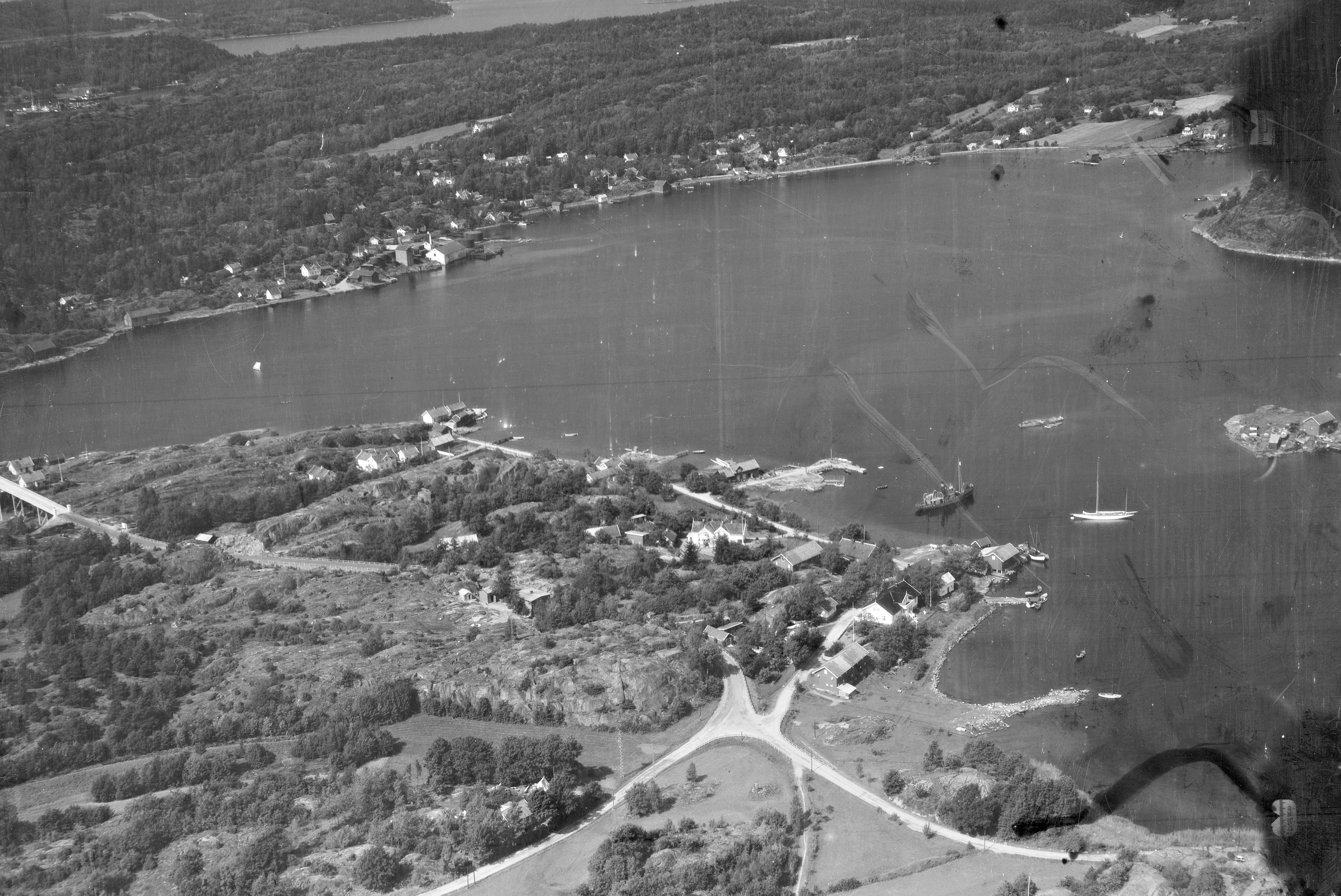 WF.S.7667